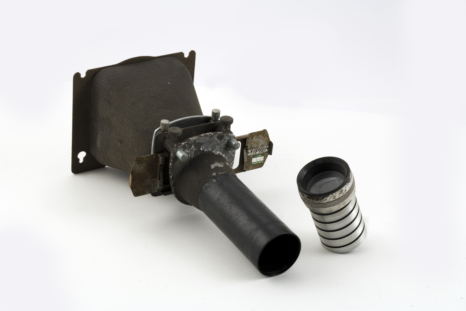 Due obiettivi per epidiascopio. Il più piccolo, un Aldis 150mm f/3.2, di forma piramidale è interrotto a metà da un telaio nel quale si inseriscono fino a due diapositive formato 24x36mm da proiettare. L'altro, un Aldis Uno f=250mm con un telaio in legno per positivi trasparenti di formato 12x12cm. Funzione Obiettivi per epidiascopio entrambi per proiezione di diapositive, uno per formati 24x36mm e l'altro per 12x12cm.